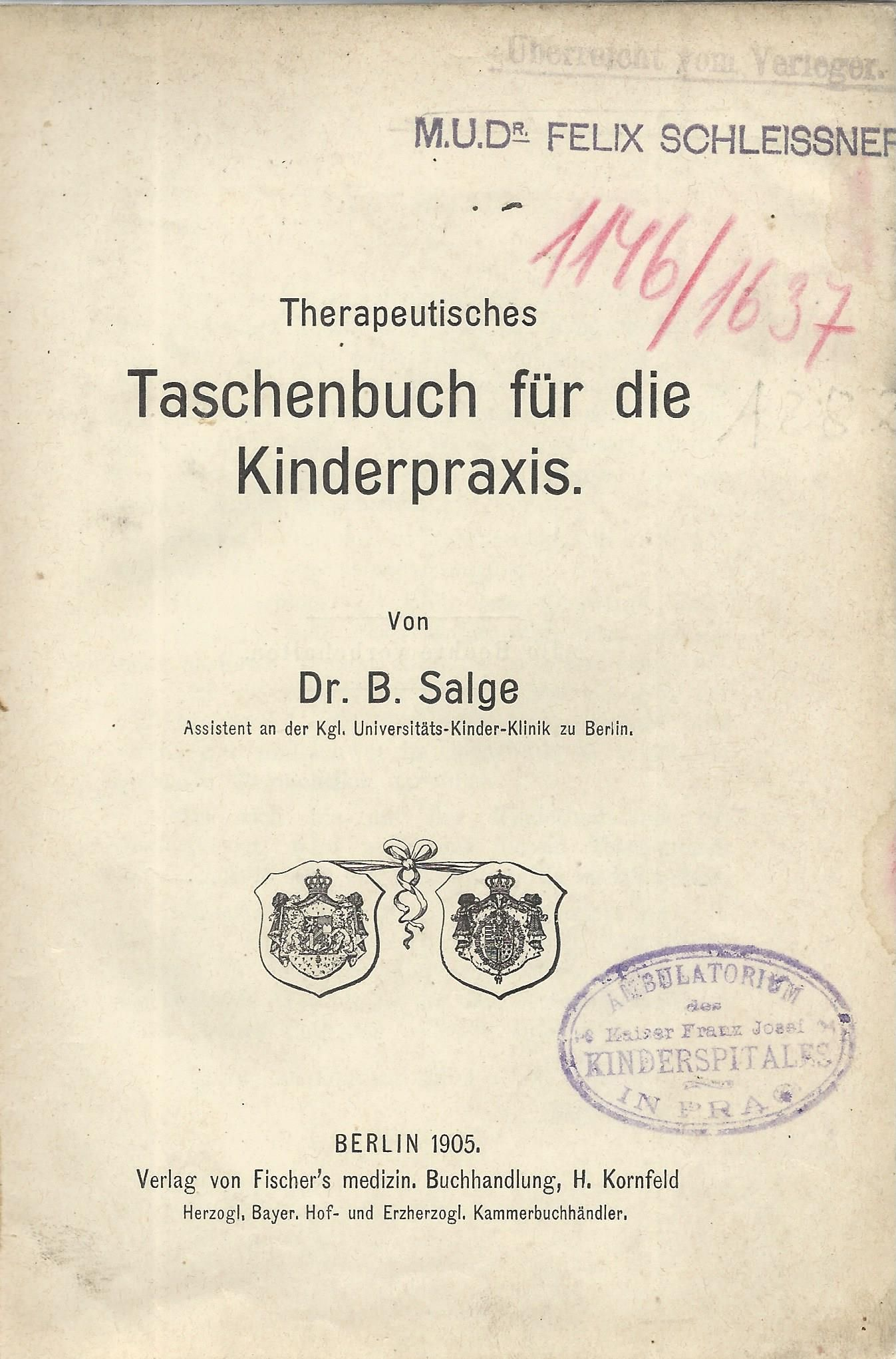 Exemplar des Kaiser-Franz Kinderspitales, Prag, aus dem Besitz von Felix Schleissner, Vorstand der Poliklinik der Kinderklinik Prag der Deutschen Medizinischen Fakultät